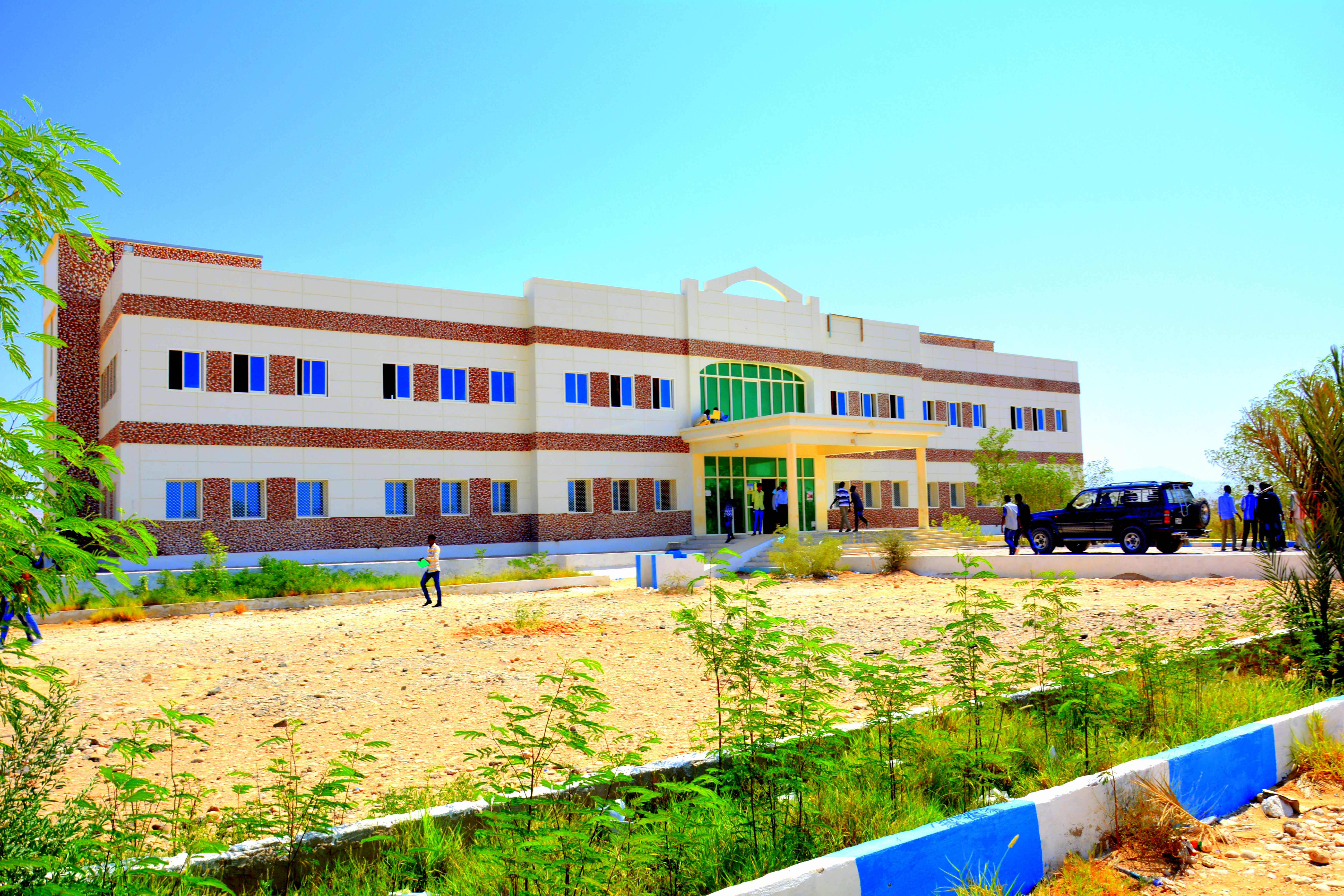 East africa university Head quater